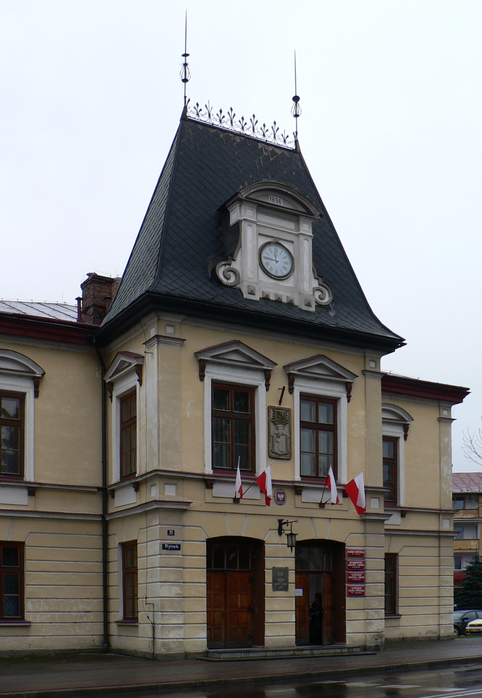 Ratusz w Lesku